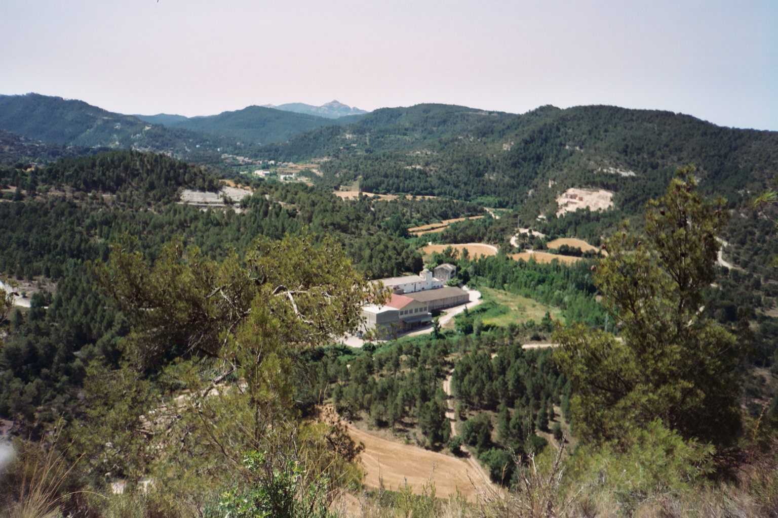 La Colònia i el Vilar (Monistrol de Calders, Moianès)